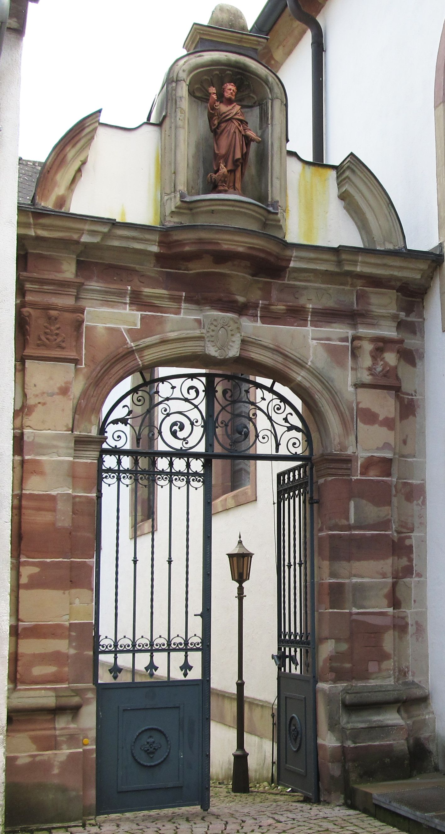 Ehemaliges Hauptportal der katholischen Pfarrkirche St. Peter in Ensheim, Saarland. Das Portal befindet sich neben der Kirche.